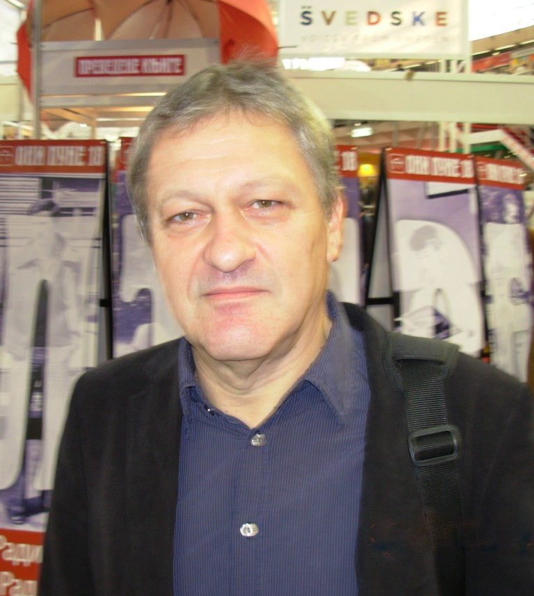 Dragan Velikić, pisac, snimljen na Sajmu knjiga u Beogradu, oktobar 2010. Slikao Goldfinger